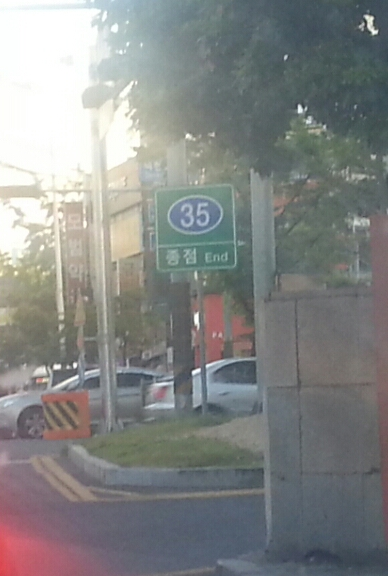 부산광역시 북구 덕천동 덕천교차로, 국도 제35호선 종점 표지